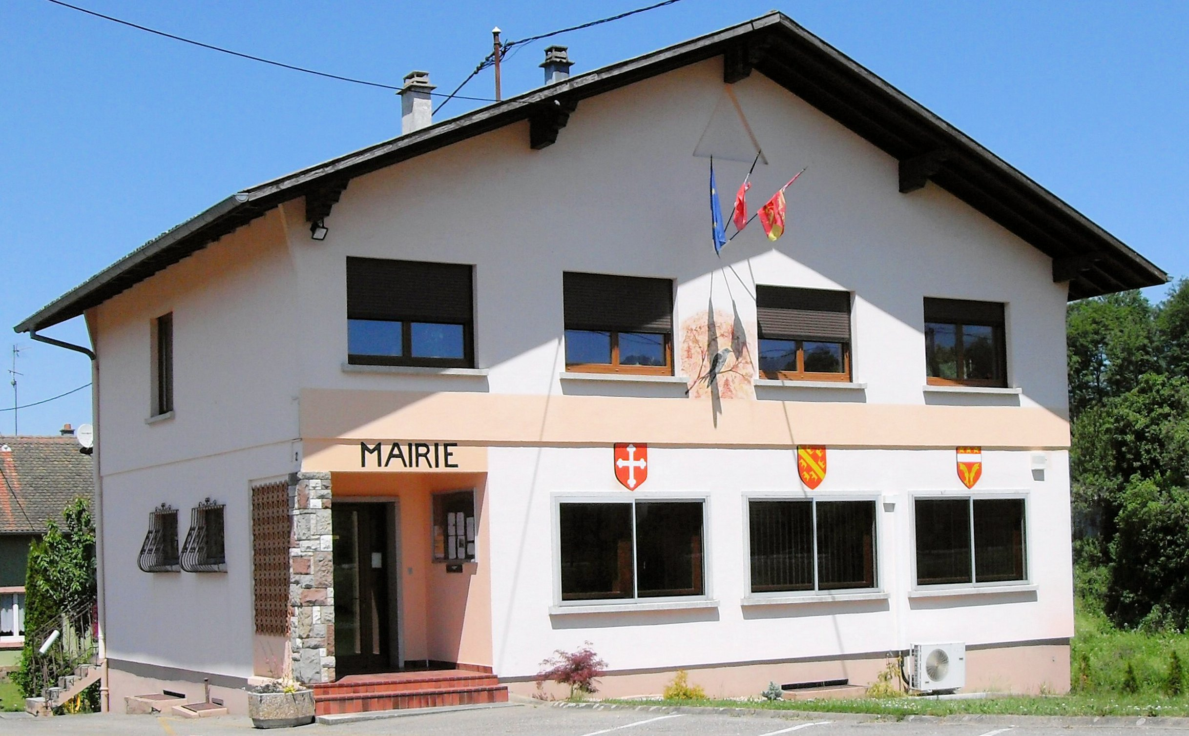 La mairie de Mertzen